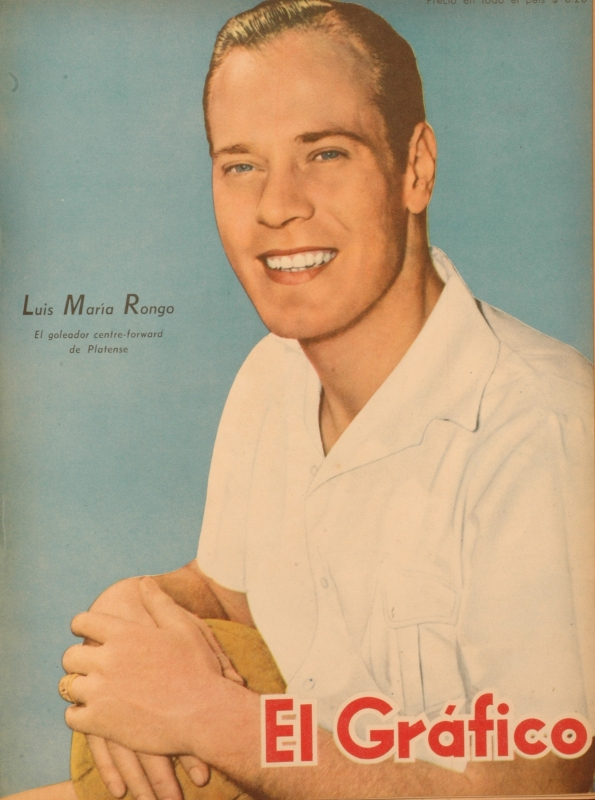 Luis María Rongo posando para la portada de la revista El Gráfico